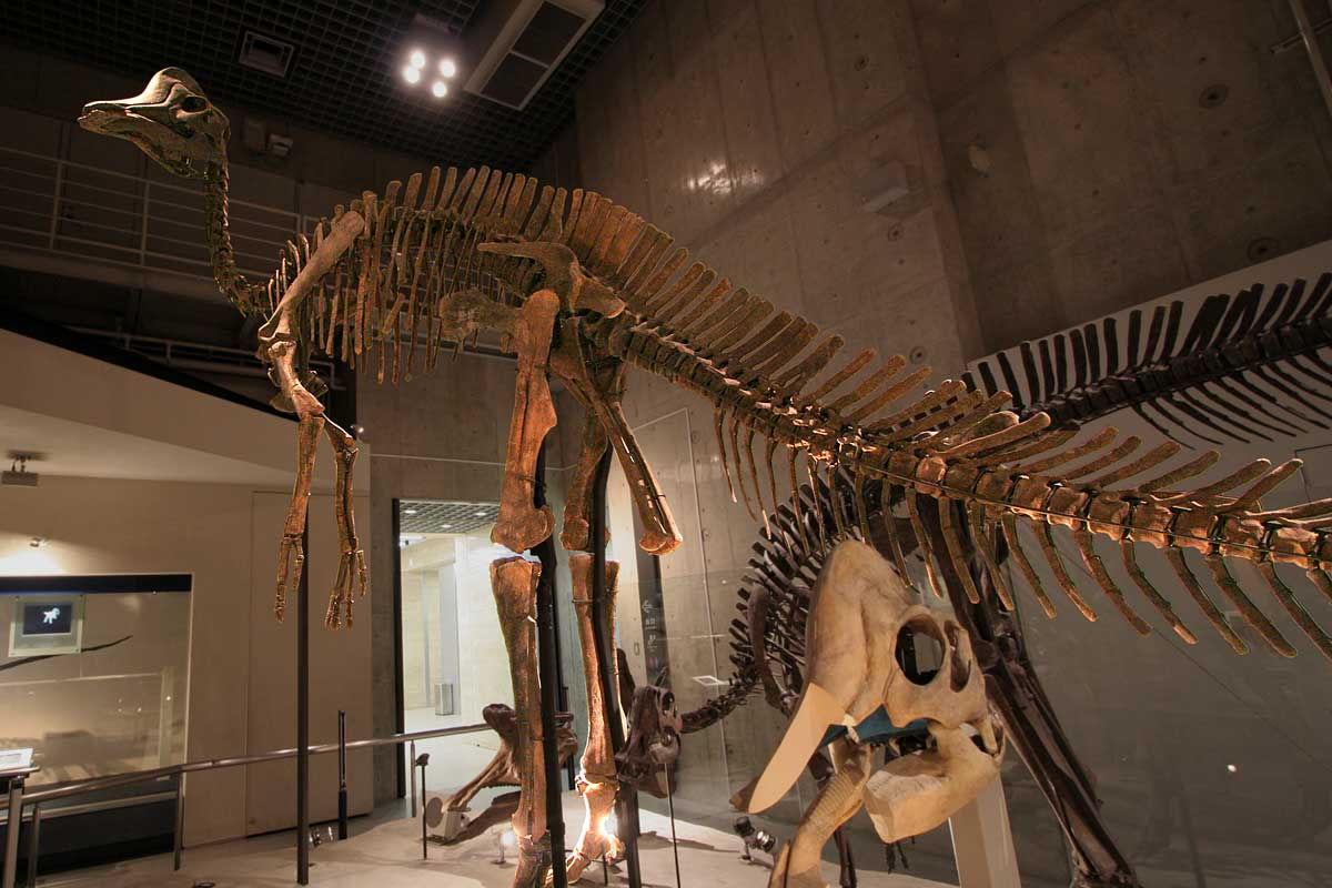 Hypacrosaurus - 01